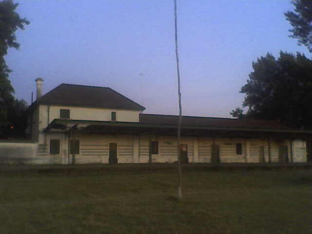 Vista del anden de la Estación San Vicente